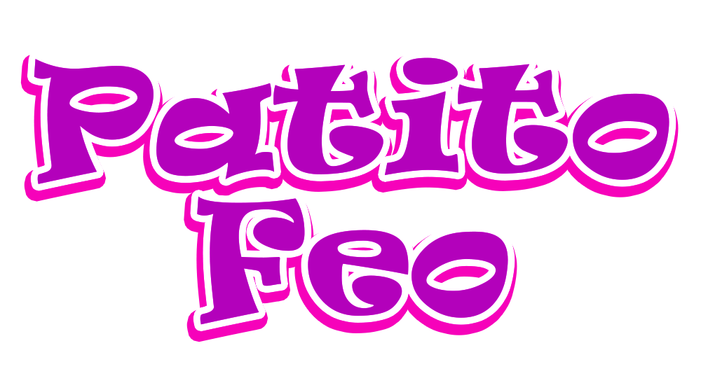 Logo de Patito feo (telenovela)